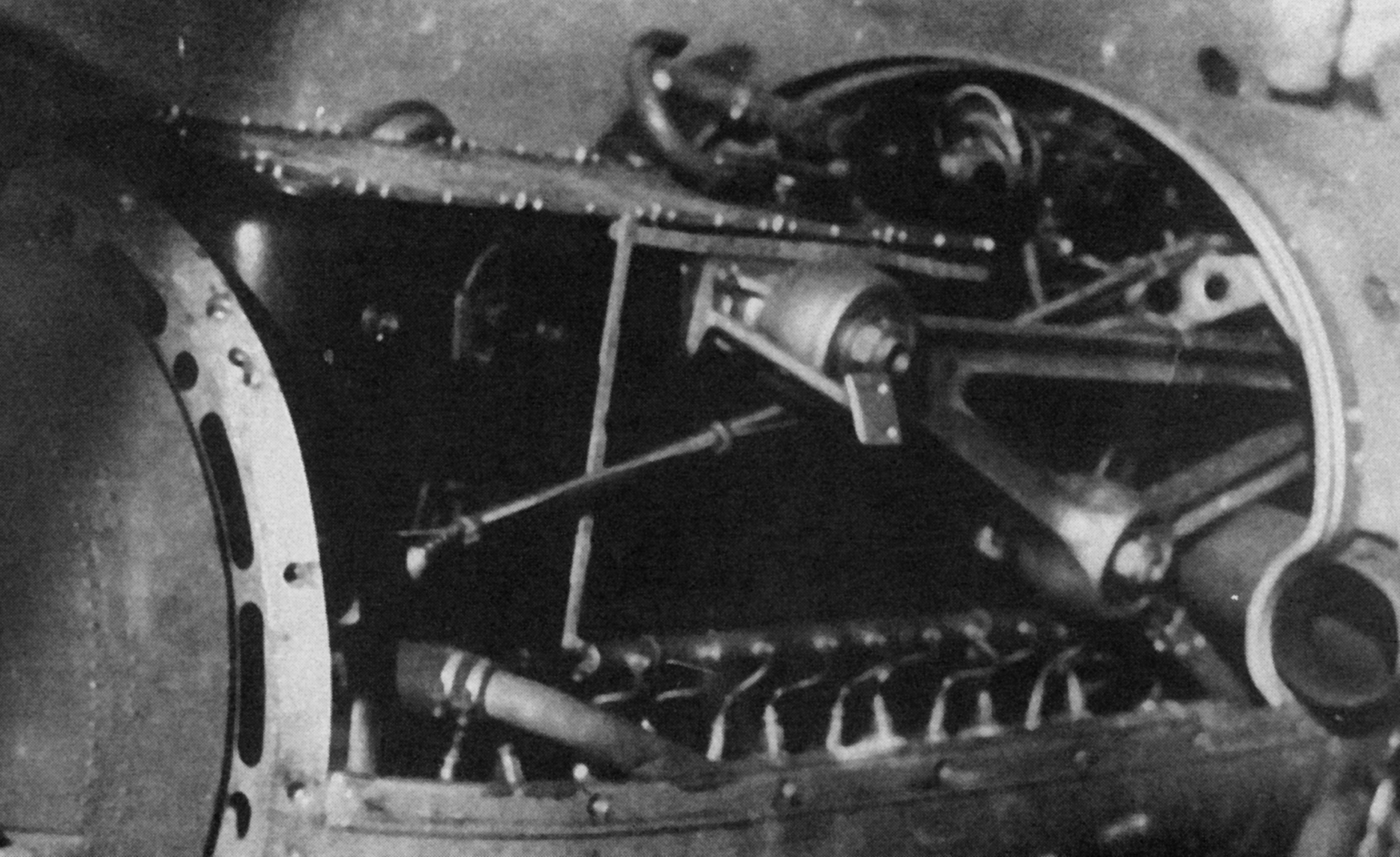 DB 600A in a Heinkel He 111B nacelle